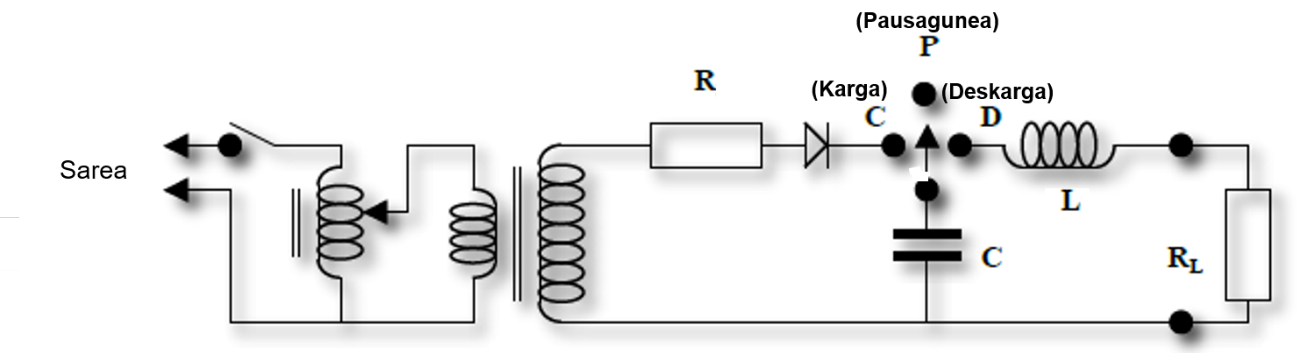 Desfibriladore batek barnean duen zirkuitu elektrikoa